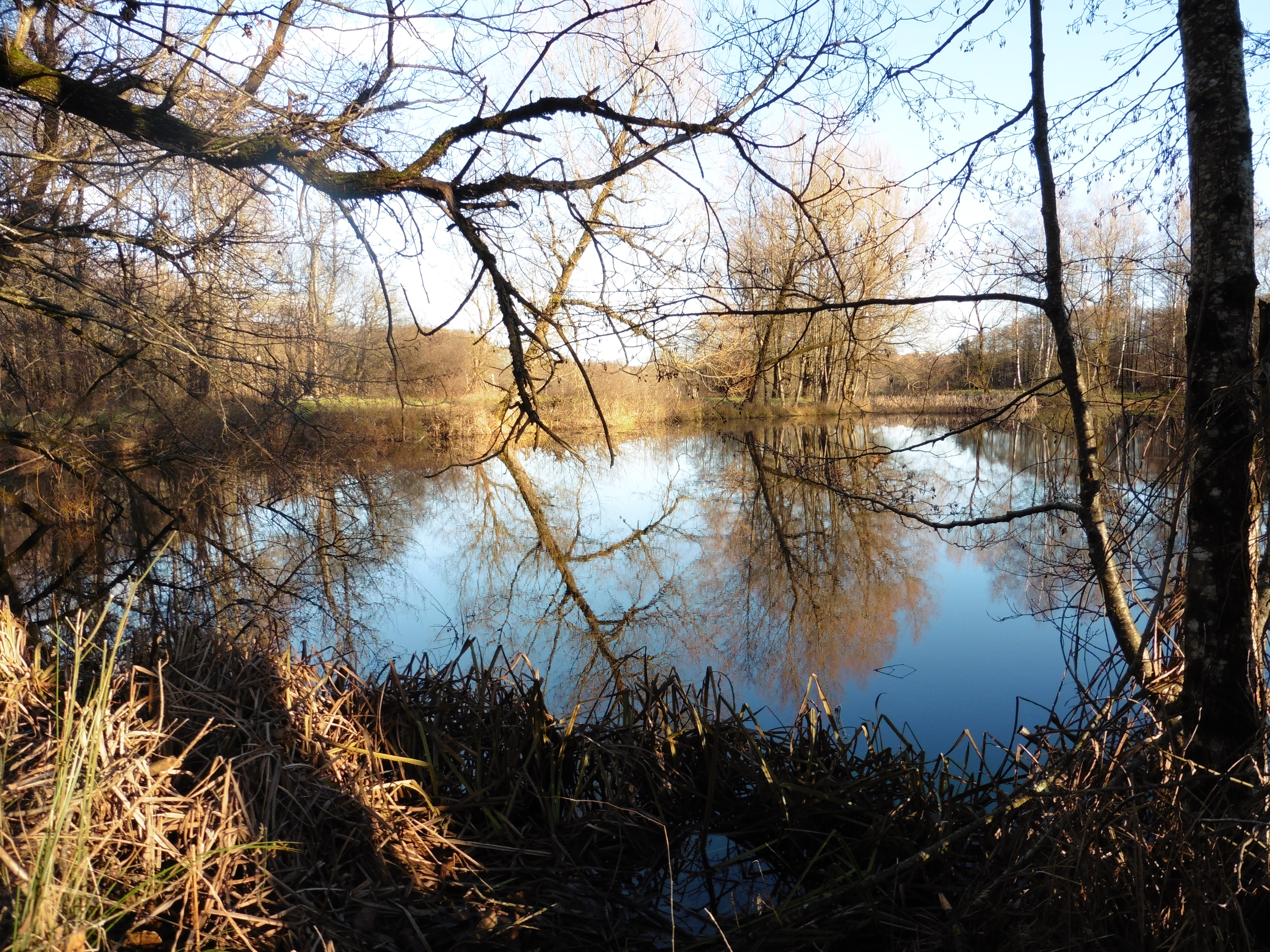 Marais